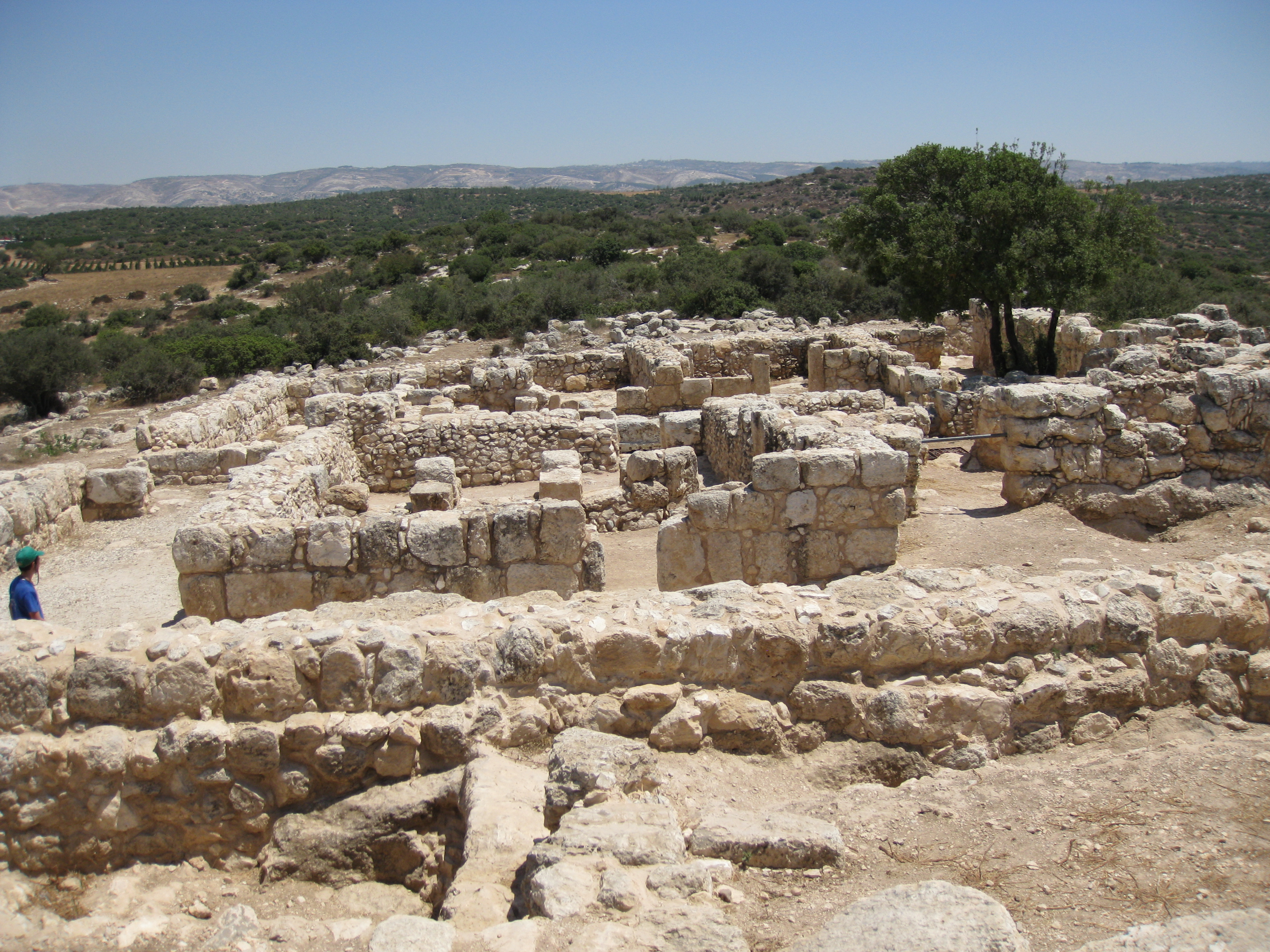 Hirbat Atri חרבת אטרי